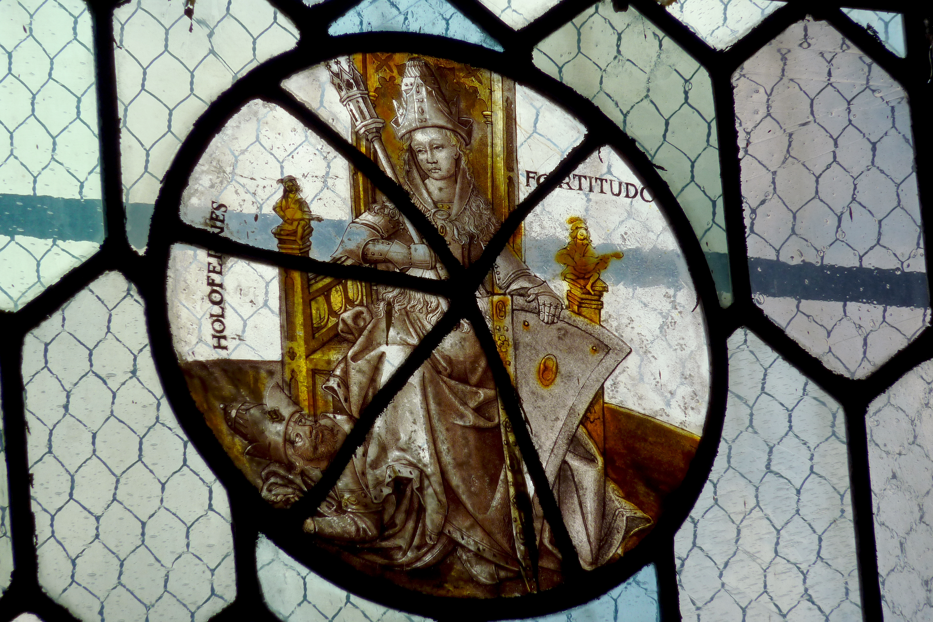 Katholische Pfarrkirche Saint-Martin in Triel-sur-Seine, einer Gemeinde im Département Yvelines (Île-de-France), Bleiglasfenster mit Fragmenten aus dem 16. Jahrhundert, Darstellung: Judith und Holofernes